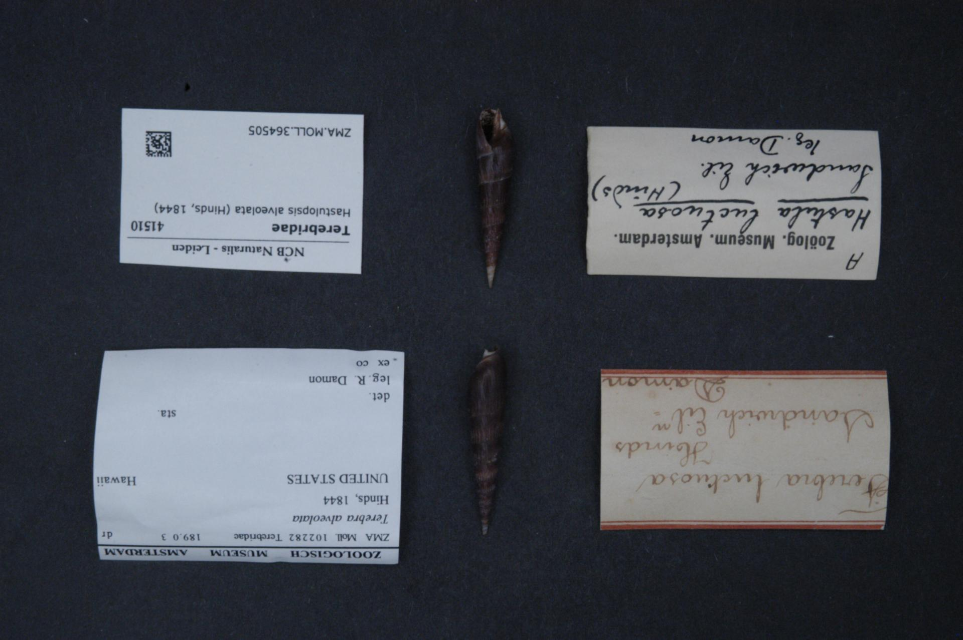 Hastulopsis alveolata (Hinds, 1844)